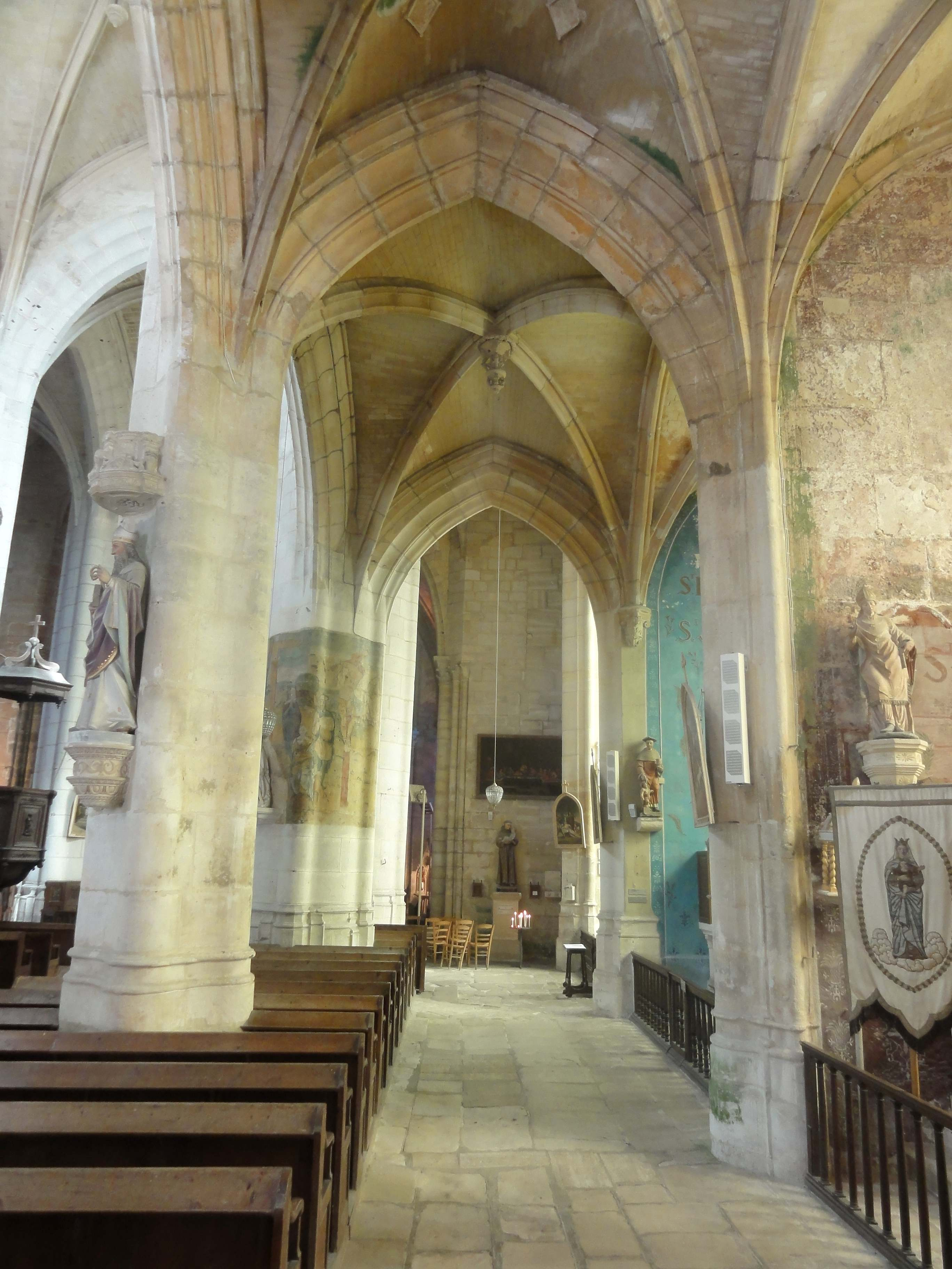 Bas-côté sud, 3e travée, vue vers l'est.